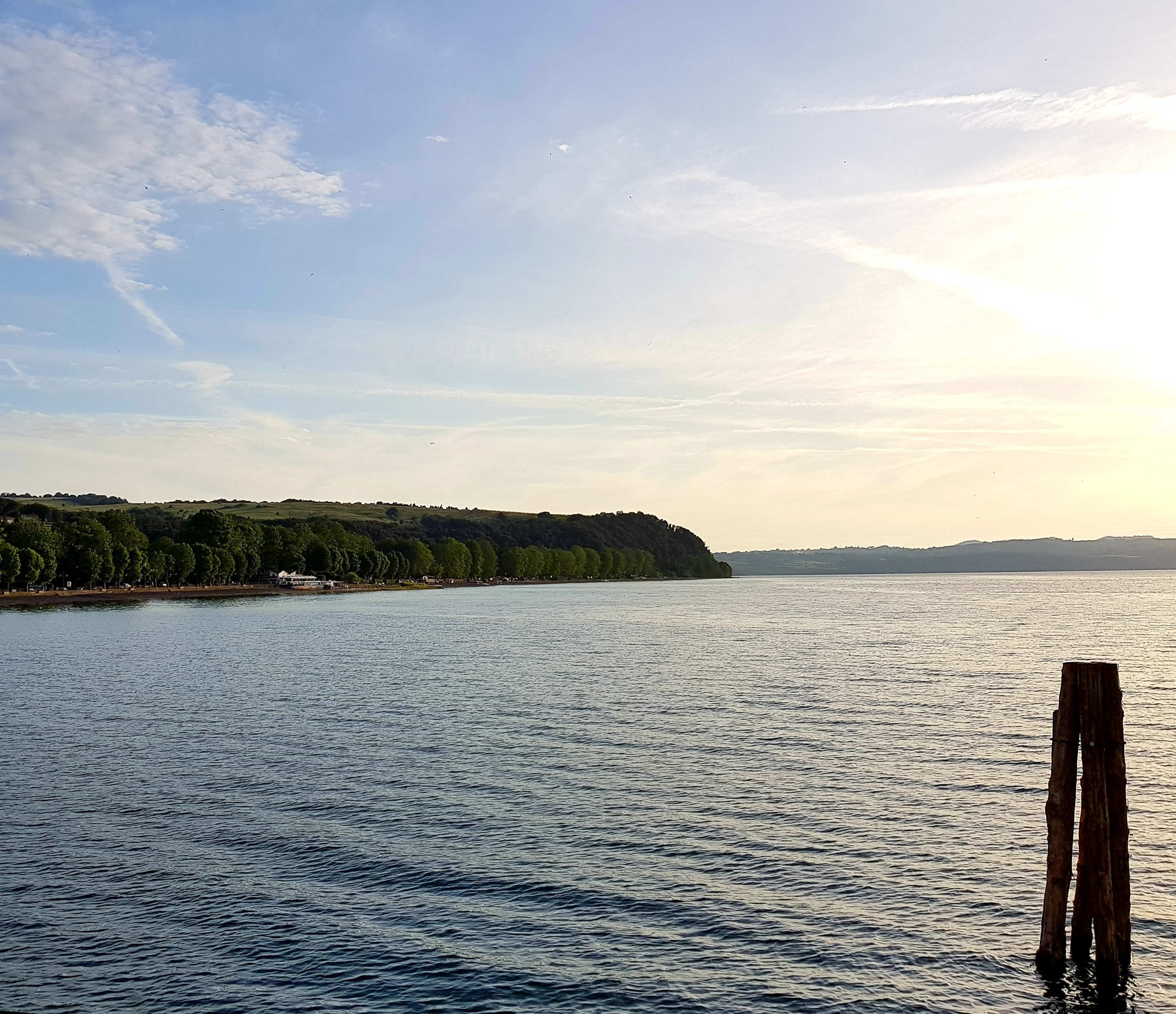 Il lago visto dal molo di Anguillara.